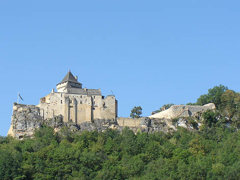 Chateau de Castelnaud, Castelnaud-la-Chapelle, Département de la Dordogne, France